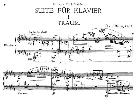 Franz Weisz Suite für Klavier Traum 1922